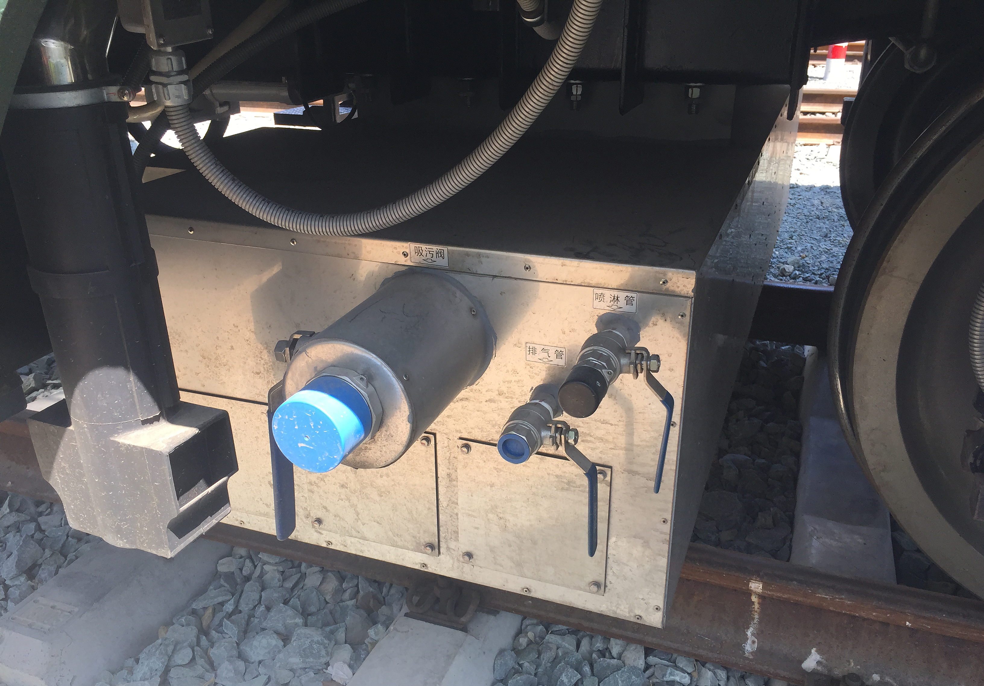 某辆25T型客车的真空集便器